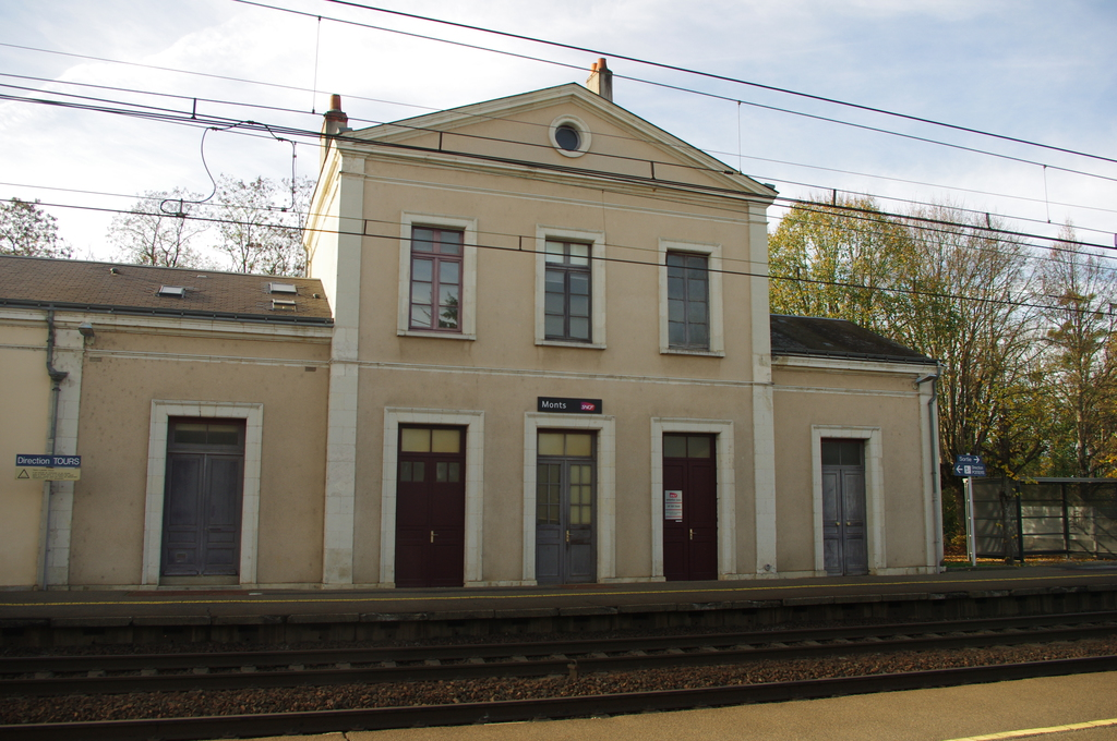 Gare de Monts, Indre-et-Loire, France